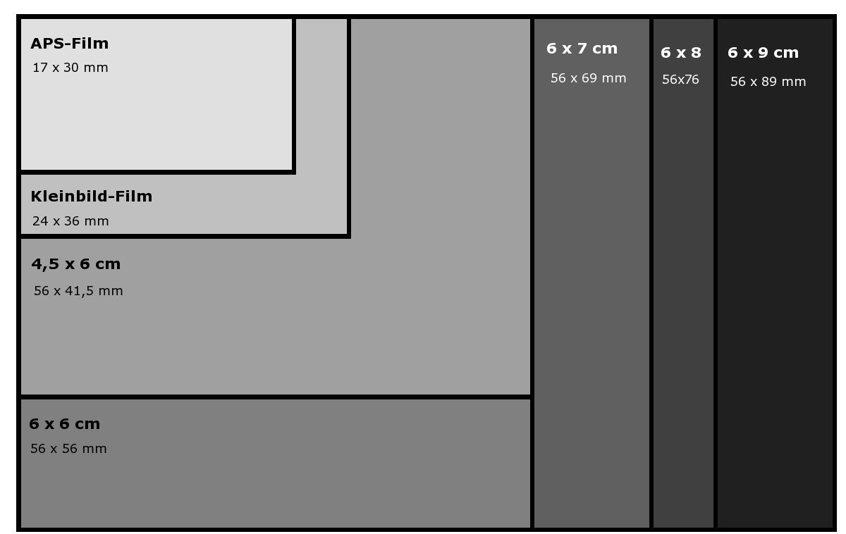 Motiv: Ausgewählte fotografische Aufnahmeformate Urheber: asb Version: 1 (23-Aug-2004)